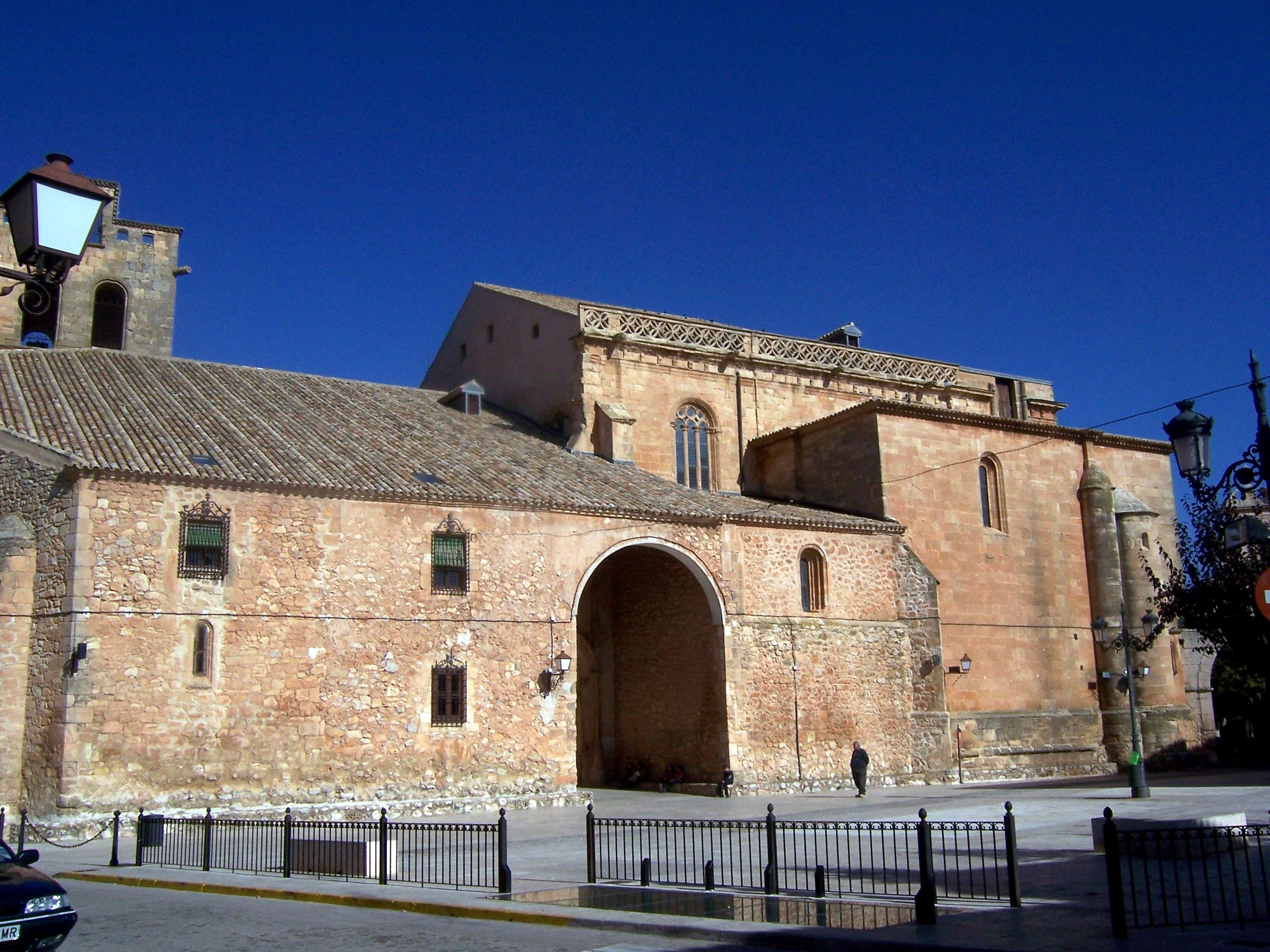 Fachada Sur de la Parroquia de Santiago Apostol de San Clemente, tomada desde el suroeste.